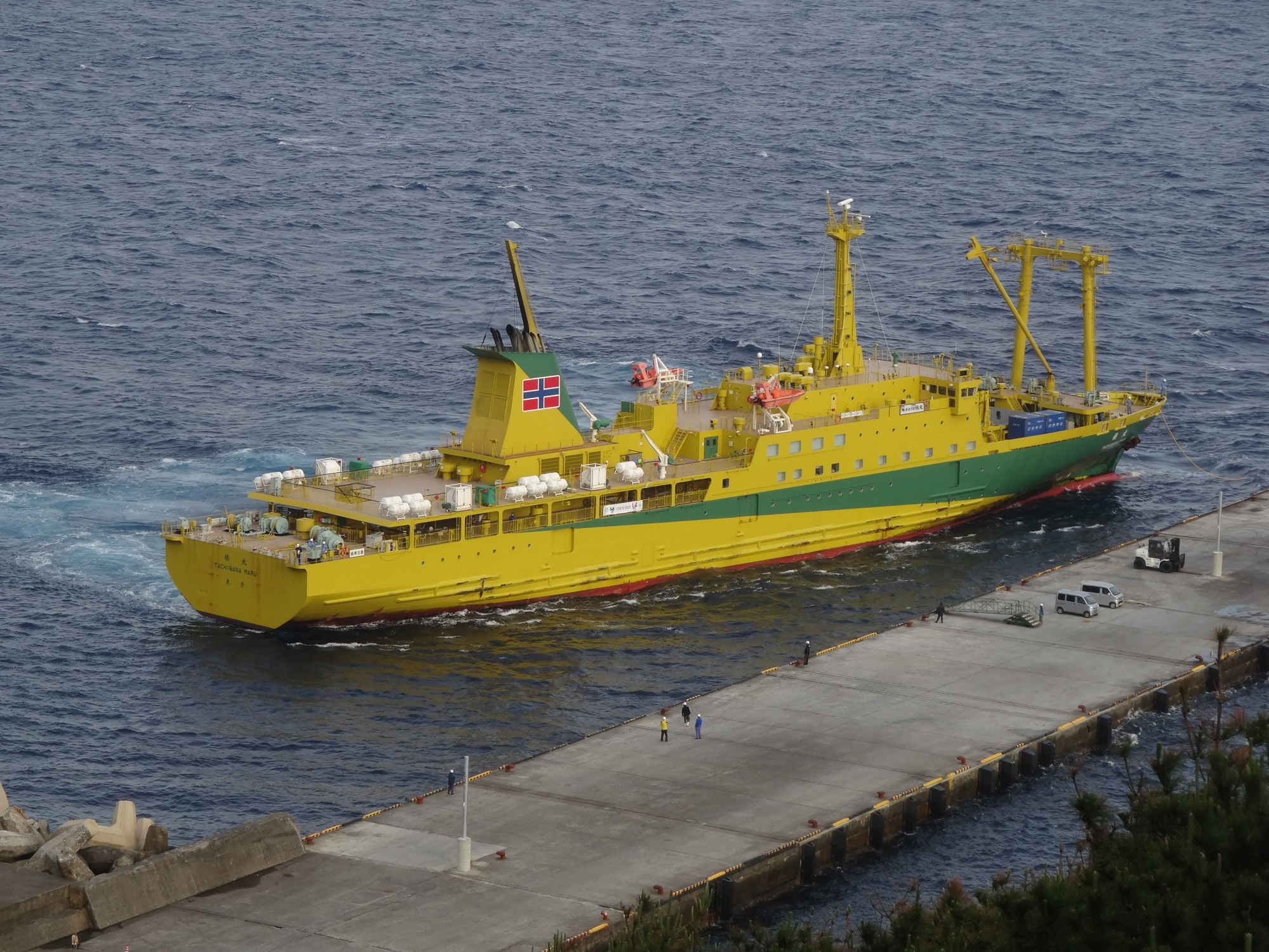 御蔵島港（東京都御蔵島村）に接岸中の橘丸